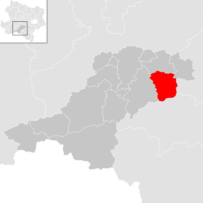 Bezirk Lilienfeld